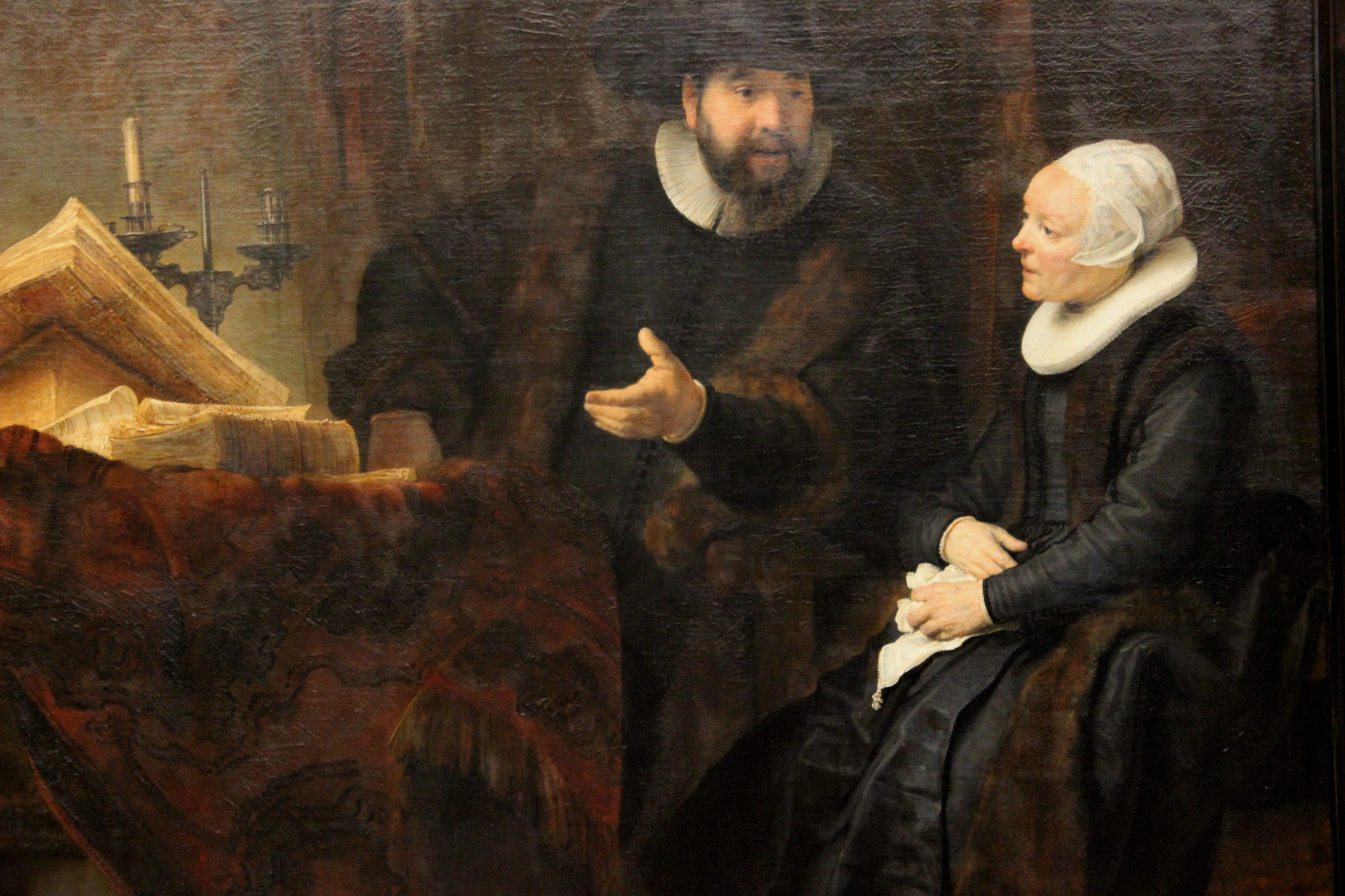 Berlín, Gemäldegalerie. Cornelis Claesz. Anslo in Conversation with his Wife, Aaltje. Rembrandt van Rijn.